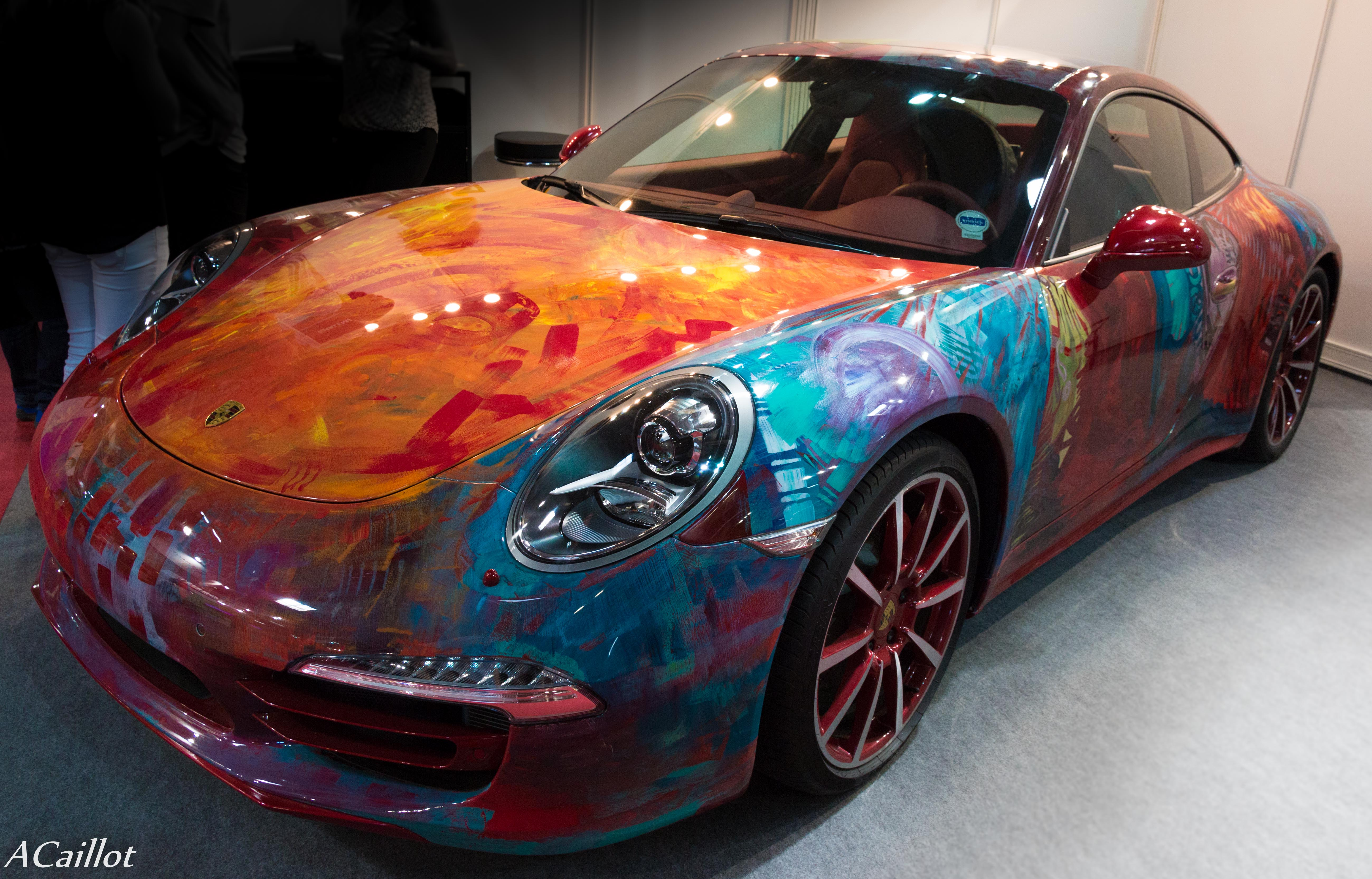 Mondial de l'auto, Paris, 2014